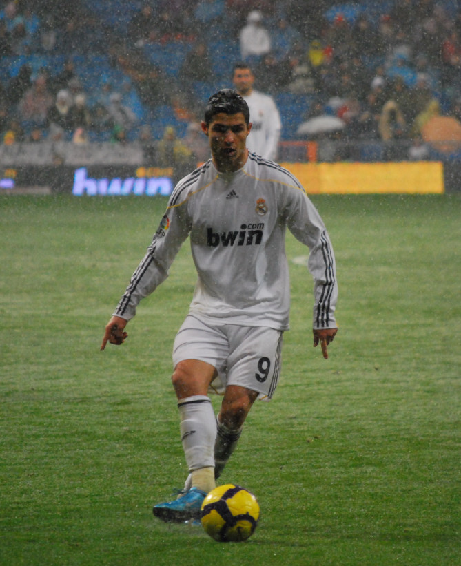 Partido con gran nevada Real Madrid 2 - Mallorca 0 Las fotos no tienen grano, es la nieve